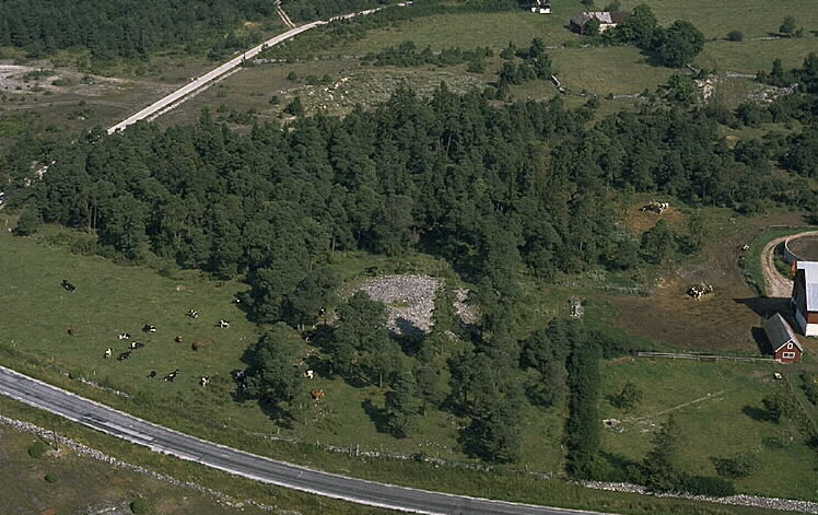 RAÄ-nummer Lärbro 163:1. Röset i bildens mitt. Motiv: Gravfält Nyckelord: Flygbilder, Riksintressen Kategori: Röse, Gravfält RAÄ-nummer Lärbro 163:1. Röset i bildens mitt.